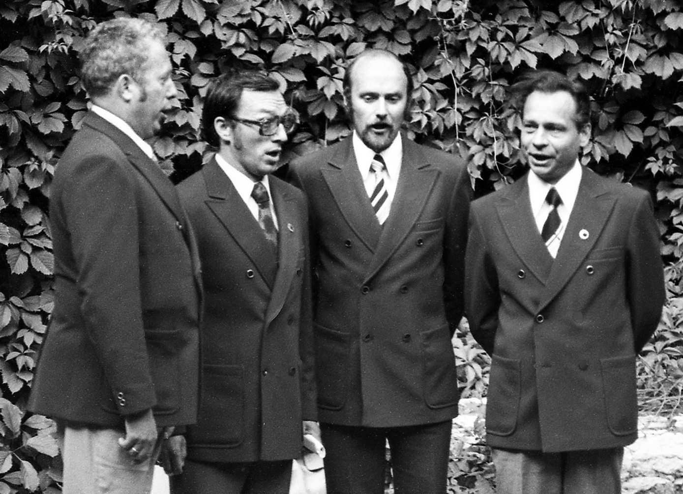 RAM-3 Kaljo Räästas, Vello Mäeots, Ole Valgma ja Konstantin Kasekivi. 74